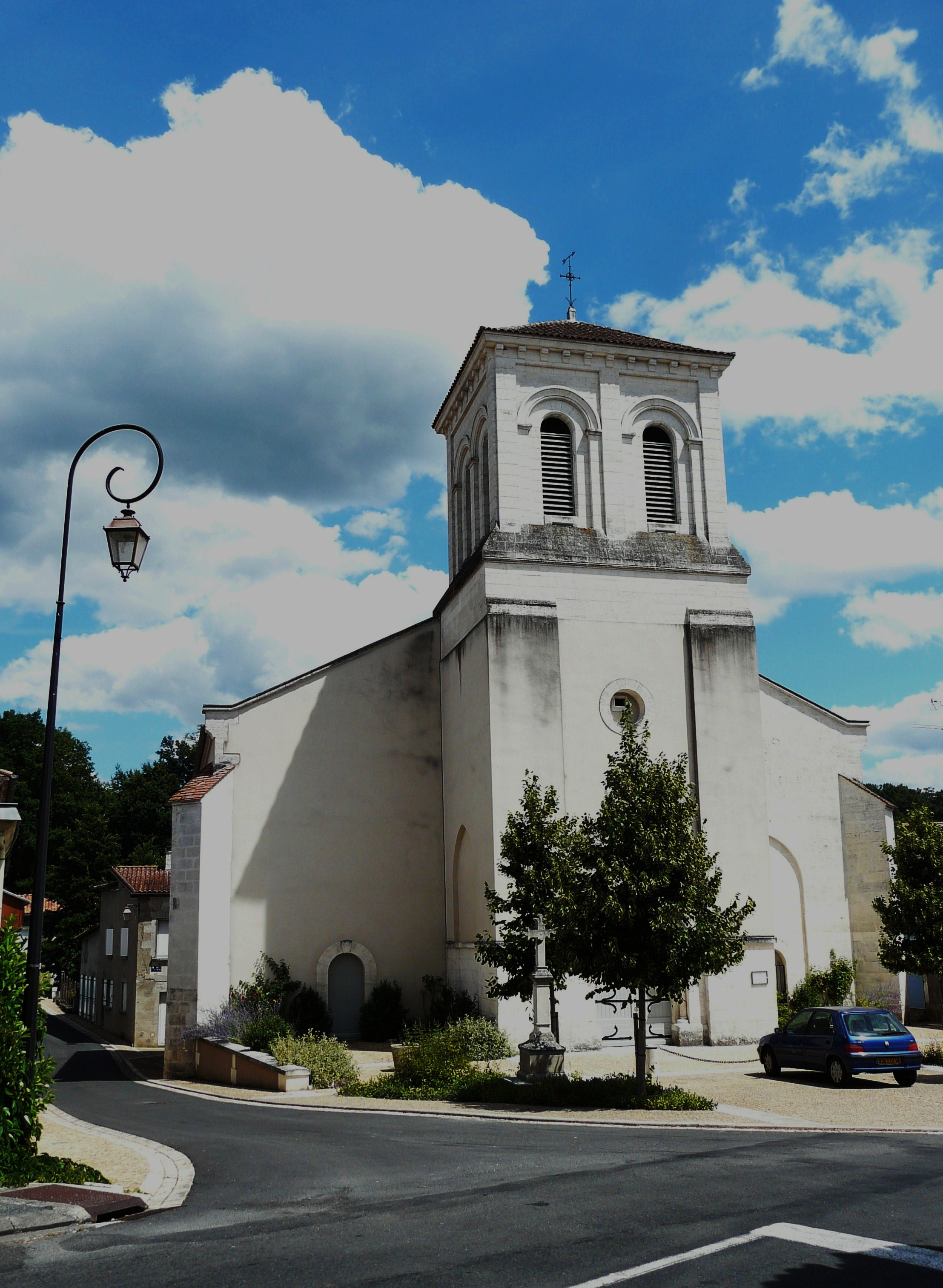 Église Saint Vincent à Saint-Vincent-de-Connezac